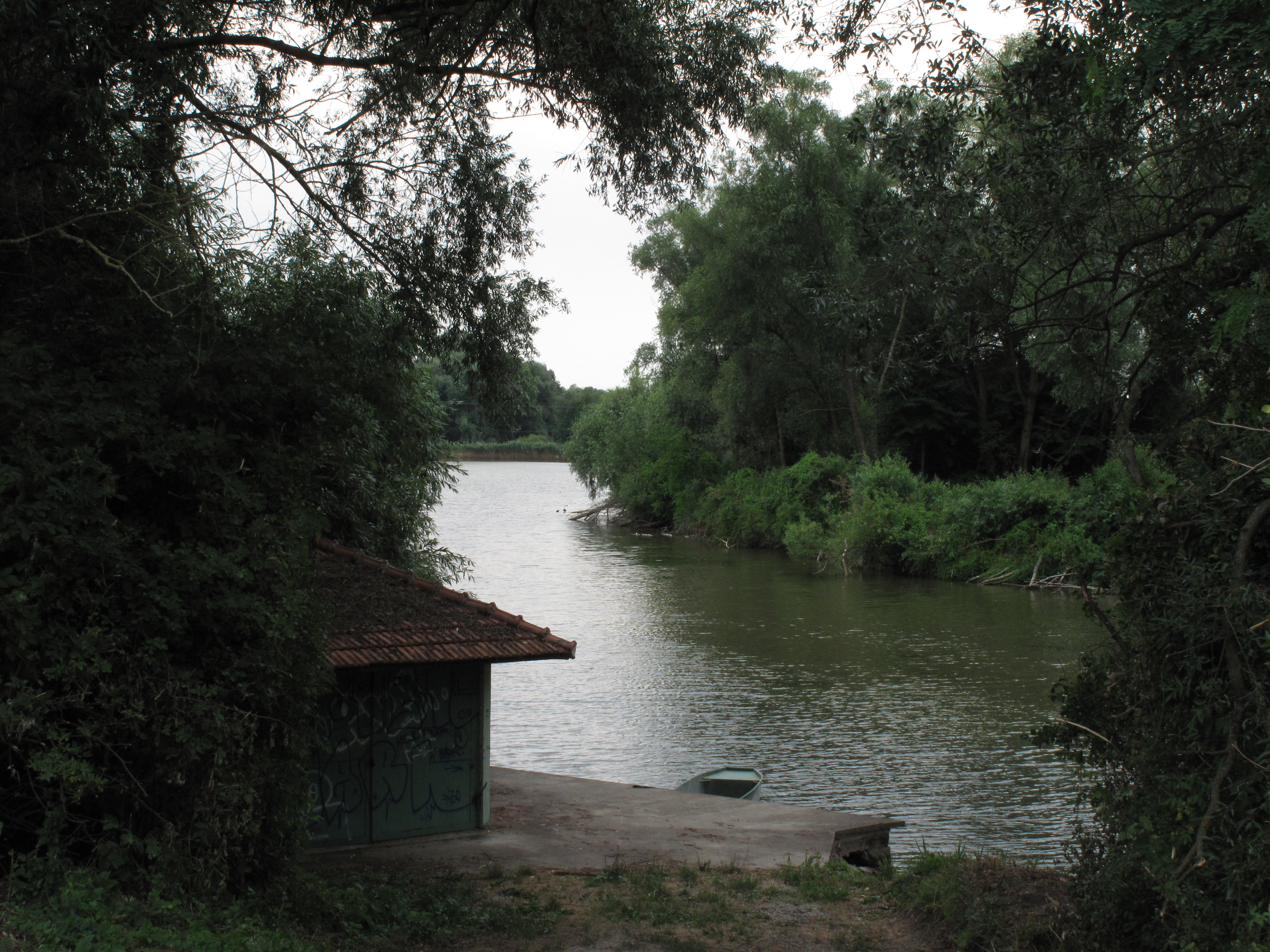 Mušlovský dolní rybník. Okres Břeclav, Česká republika.